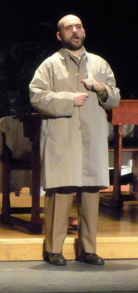 O actor galego Federico Pérez na representación da obra O florido pénsil, no Pazo da Cultura de Pontevedra